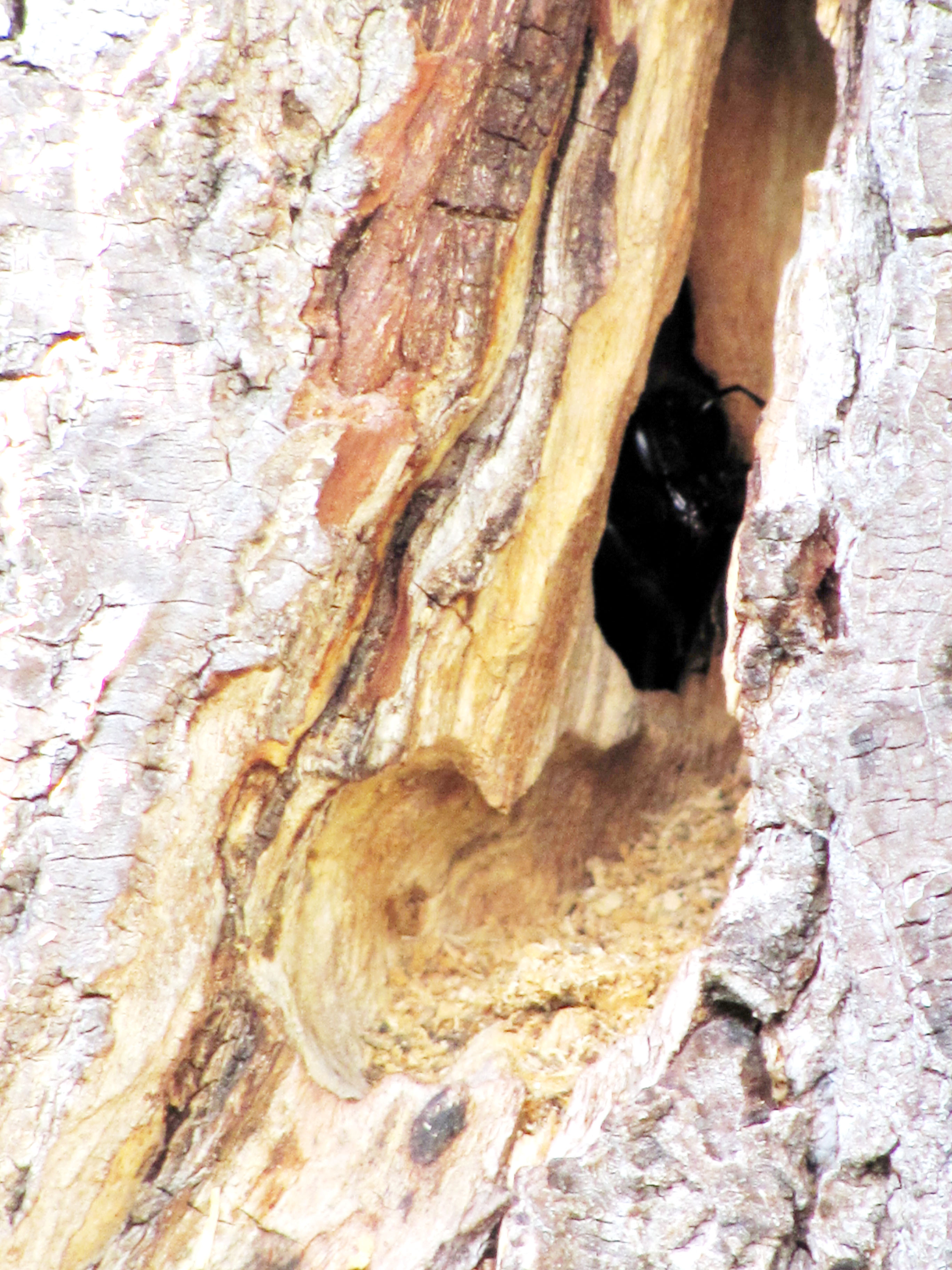 Radebeul, Holzbienen-Nestgänge in Totholzstamm einer Trauerweide